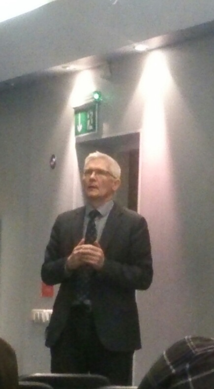 Toomas Liivamägi Tartu kirjanduslinna infopäeval